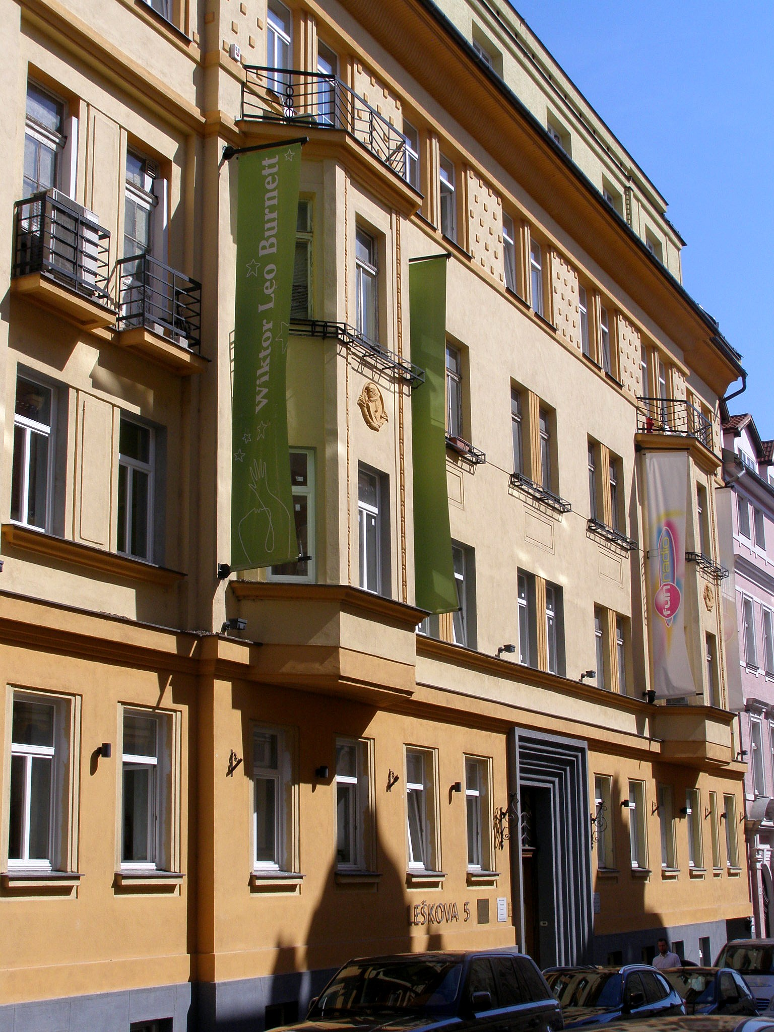 Leškova ul. č. 5 Object location48° 09′ 15.84″ N, 17° 06′ 26.28″ E